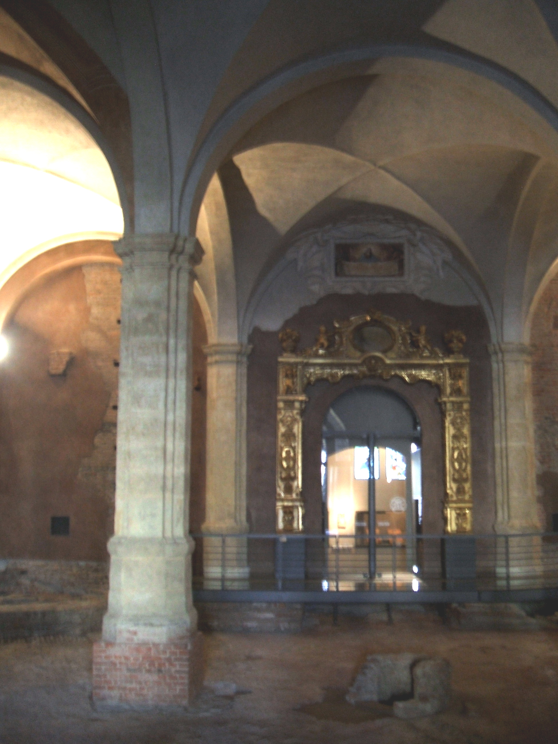 I resti della porta romana, sulla quale sorge Palazzo Madama a Torino